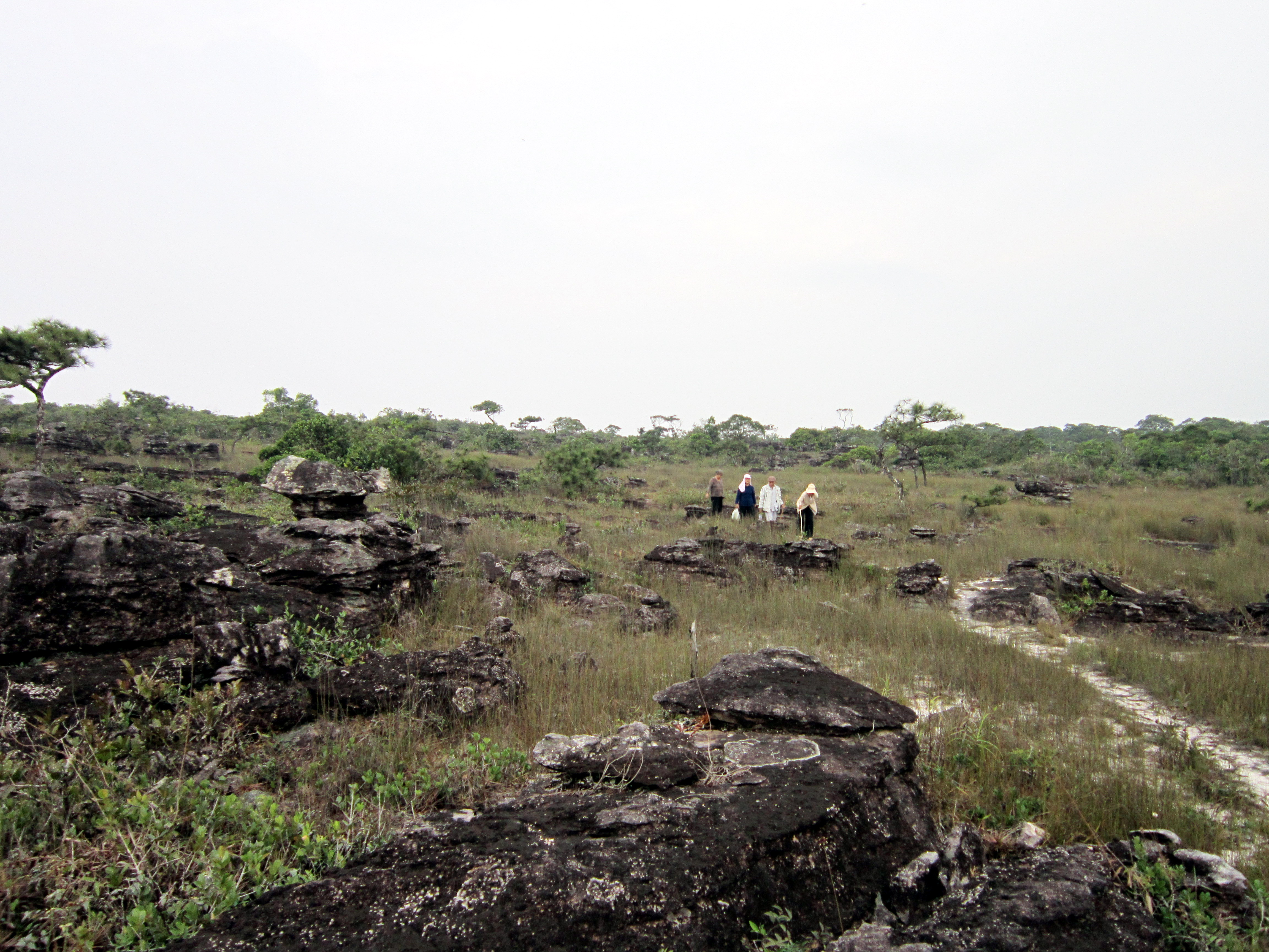 Trên đỉnh núi Bokor (người Việt gọi là núi Tà Lơn) ở tỉnh Kampot (Cam puchia).